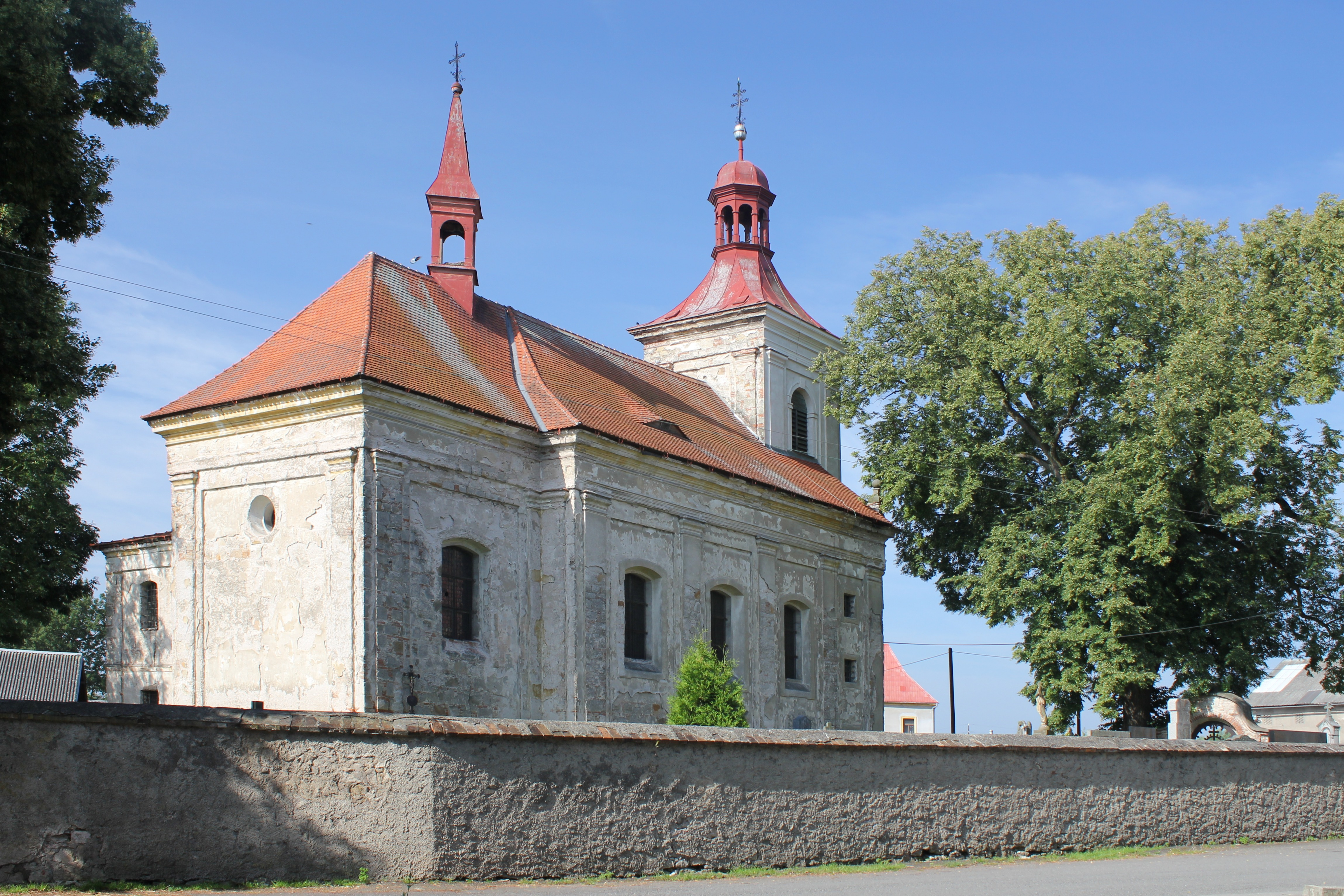 Kostel Povýšení Svatého Kříže, Loukovec